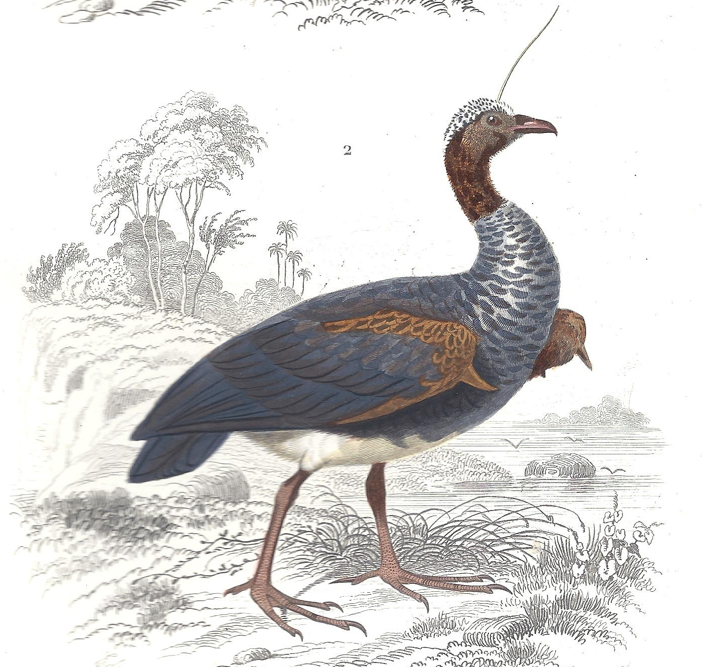 Kamichi cornu dessiné par Traviés dans le dictionnaire universel d'histoire naturelle de Charles d'Orbigny (1867)